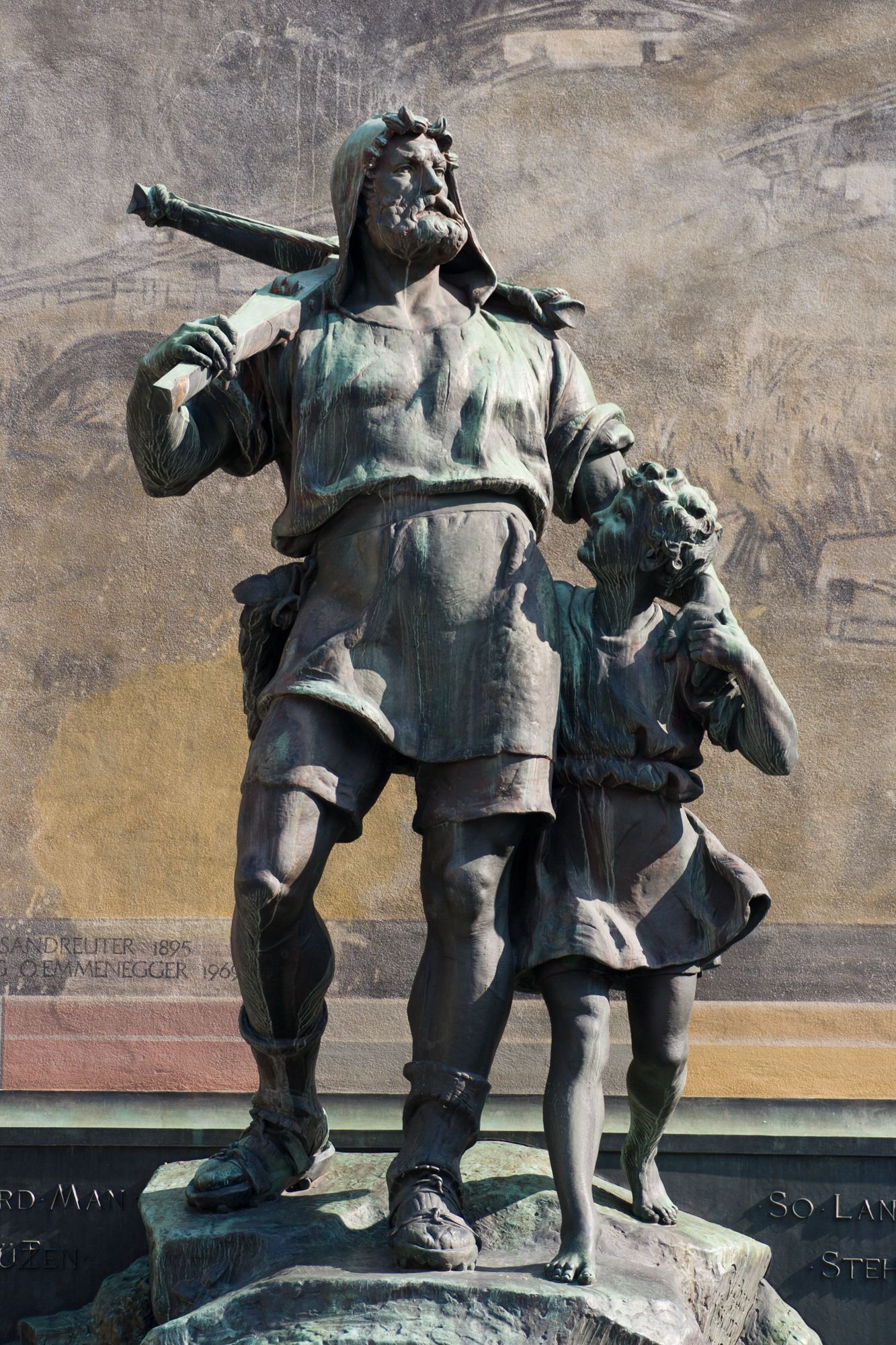 Tell-Denkmal in Altdorf